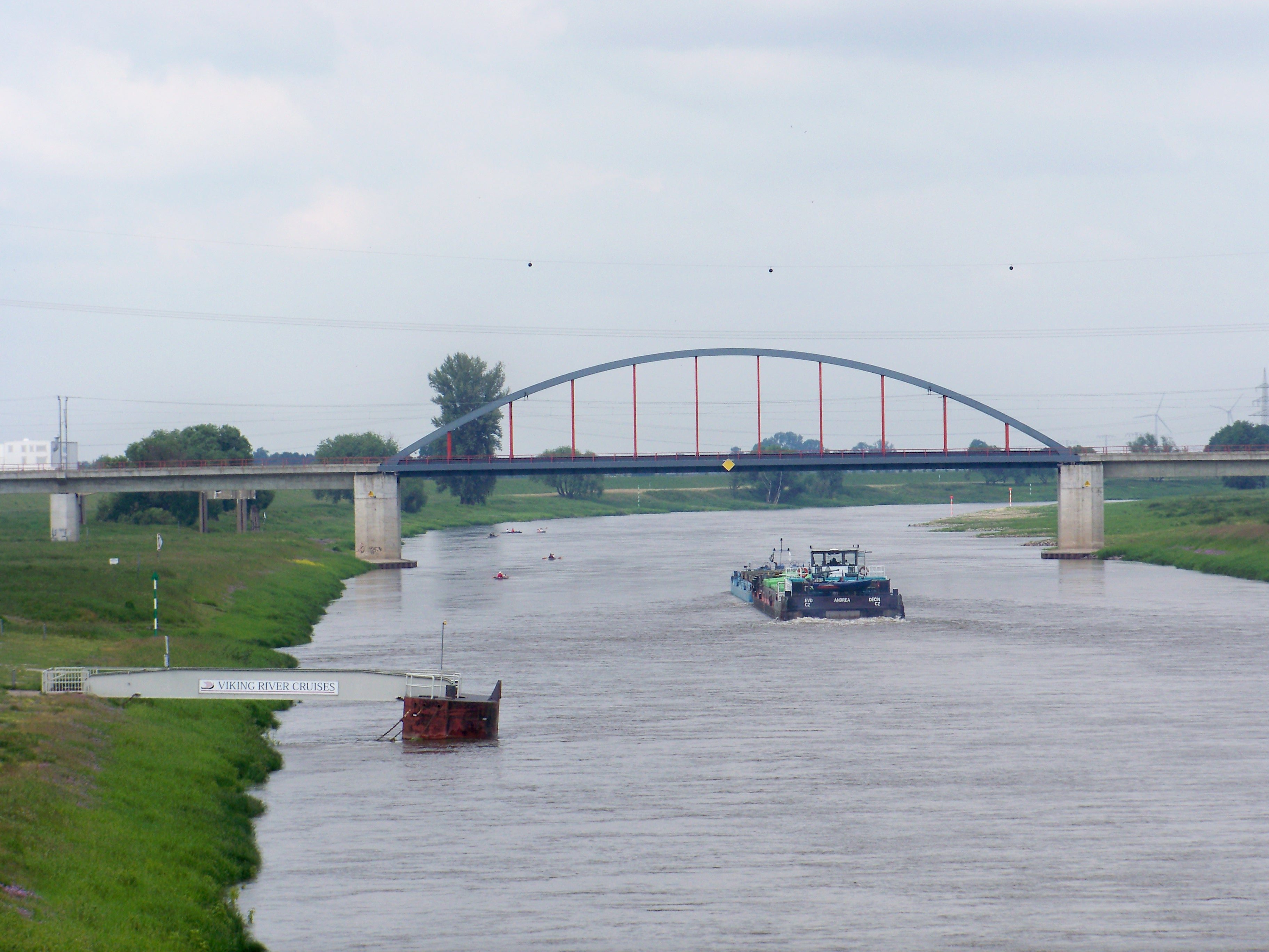 Brücke der Eisenbahnstrecke Cottbus-Eilenburg-Leipzig/Halle über die Elbe in Torgau